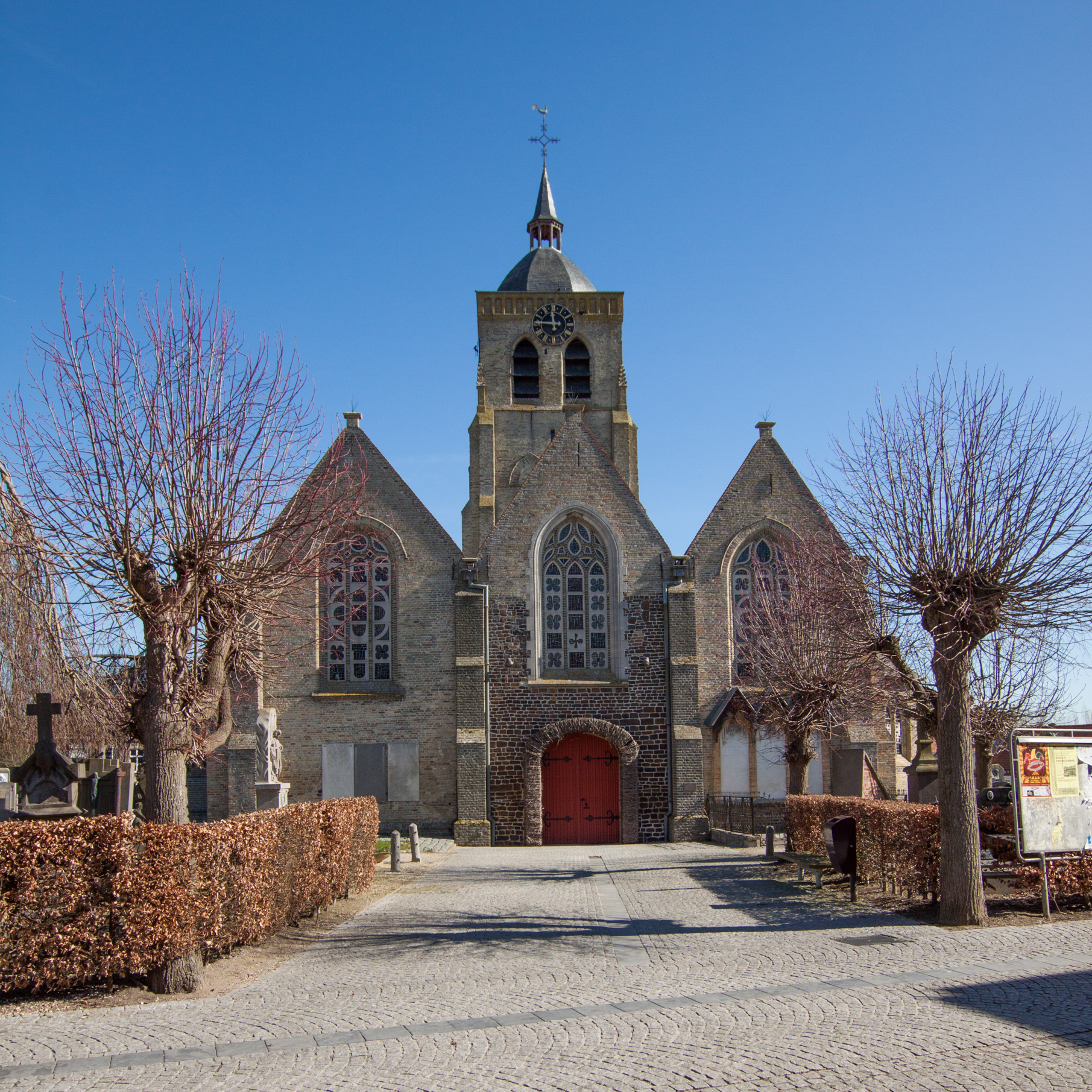 Proven Churchyard